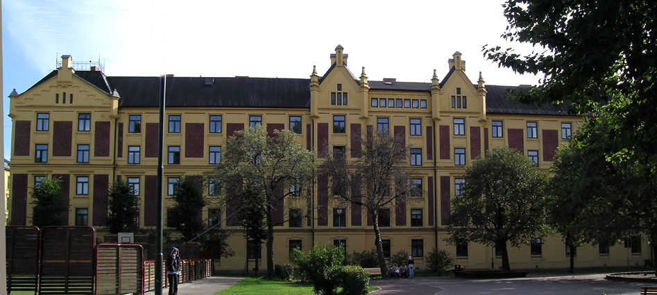 Heimdalsgata 26, Oslo. "Slottet". Built 1896-1898. Architect: Matheus Mosgaard. Rudolf Nilsen's "Nr. 13".